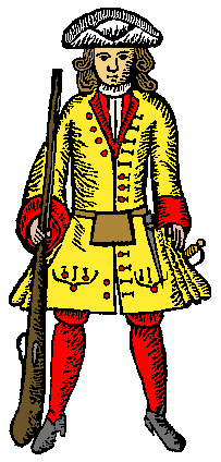 Uniforme del Regiment de Nostra Senyora del Roser a partir del novembre de 1713. Figura basada en els dibuixos del manual d'instrucció del coronel Ferrer (1714)